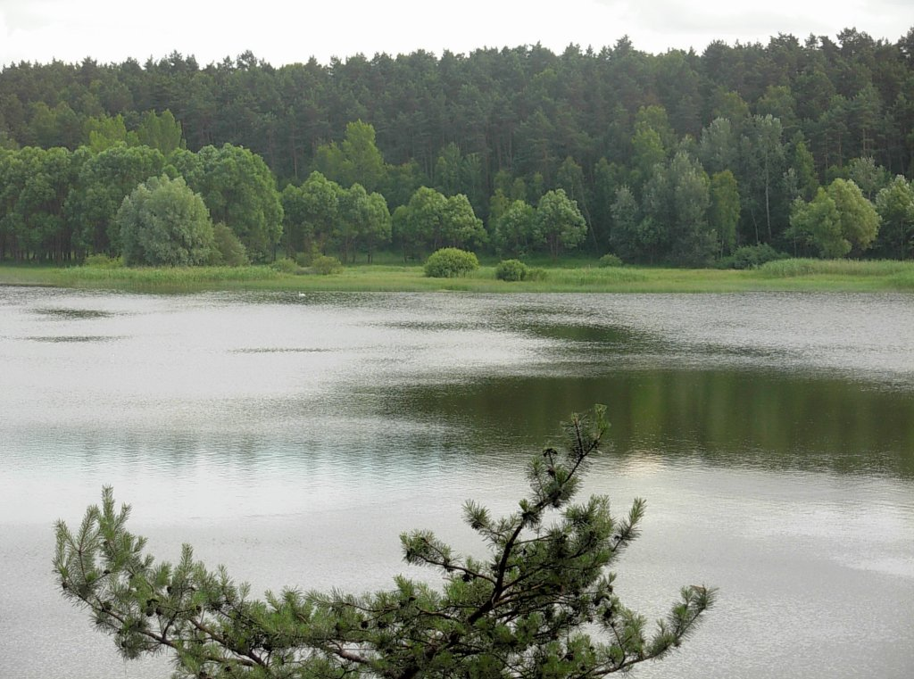 Jezioro Nowe w Puszczy Bydgoskiej koło Gniewkowa